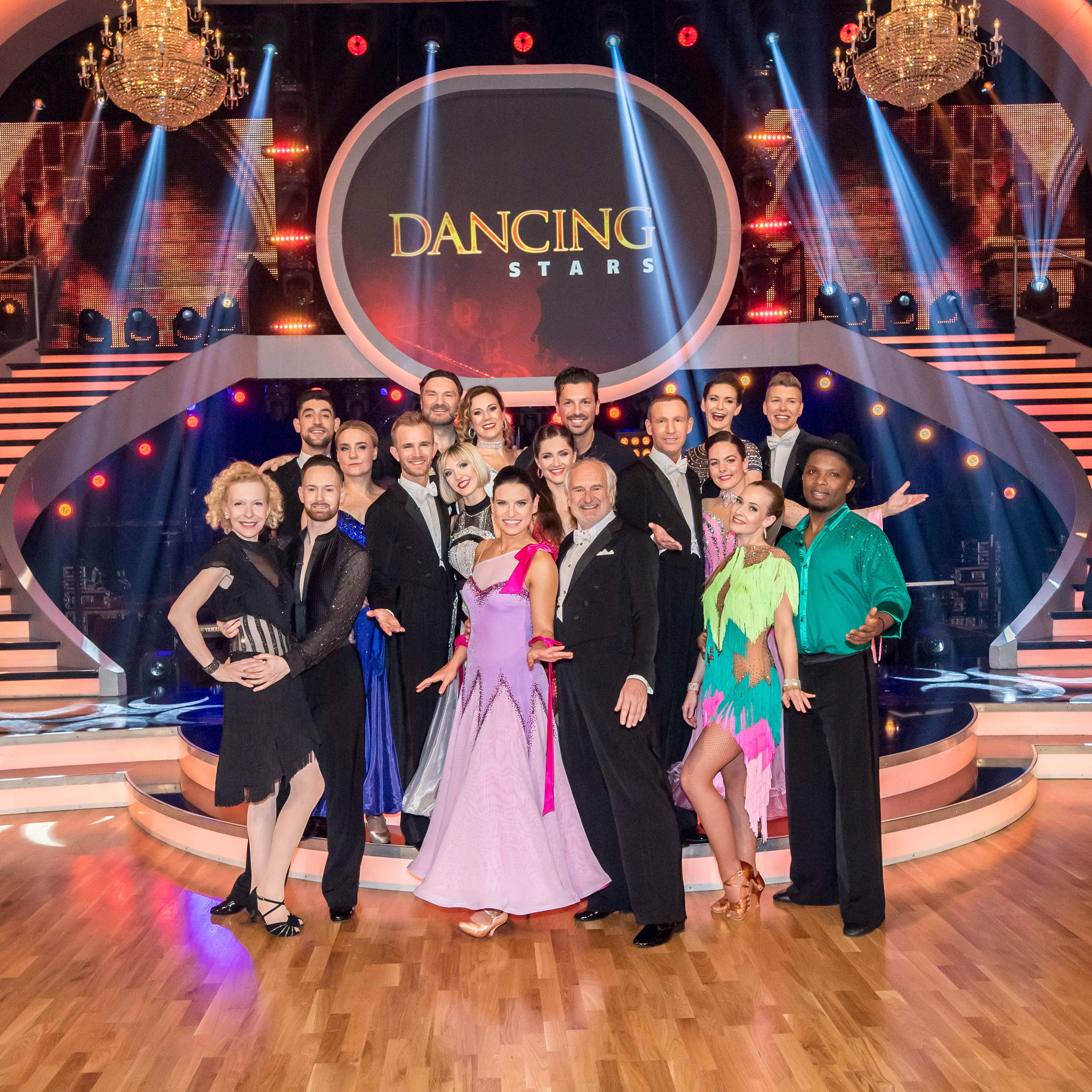 Wien, 15. März 2019: ORF Dancing Stars, 1. Folge - Bild zeigt alle Teilnehmer.